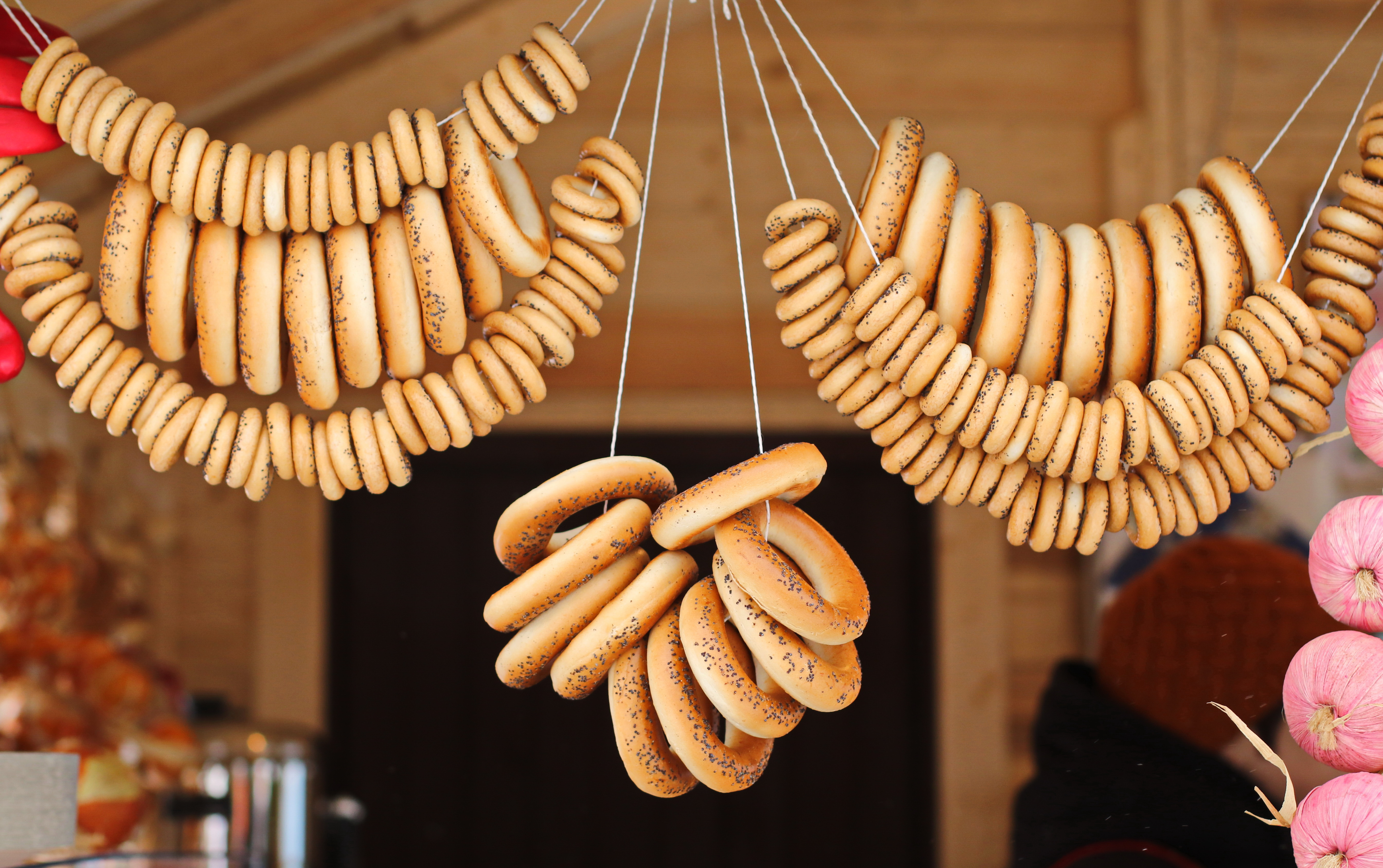 Русские сушки и бублики с маком на базаре в Масленицу в Санкт-Петербурге.